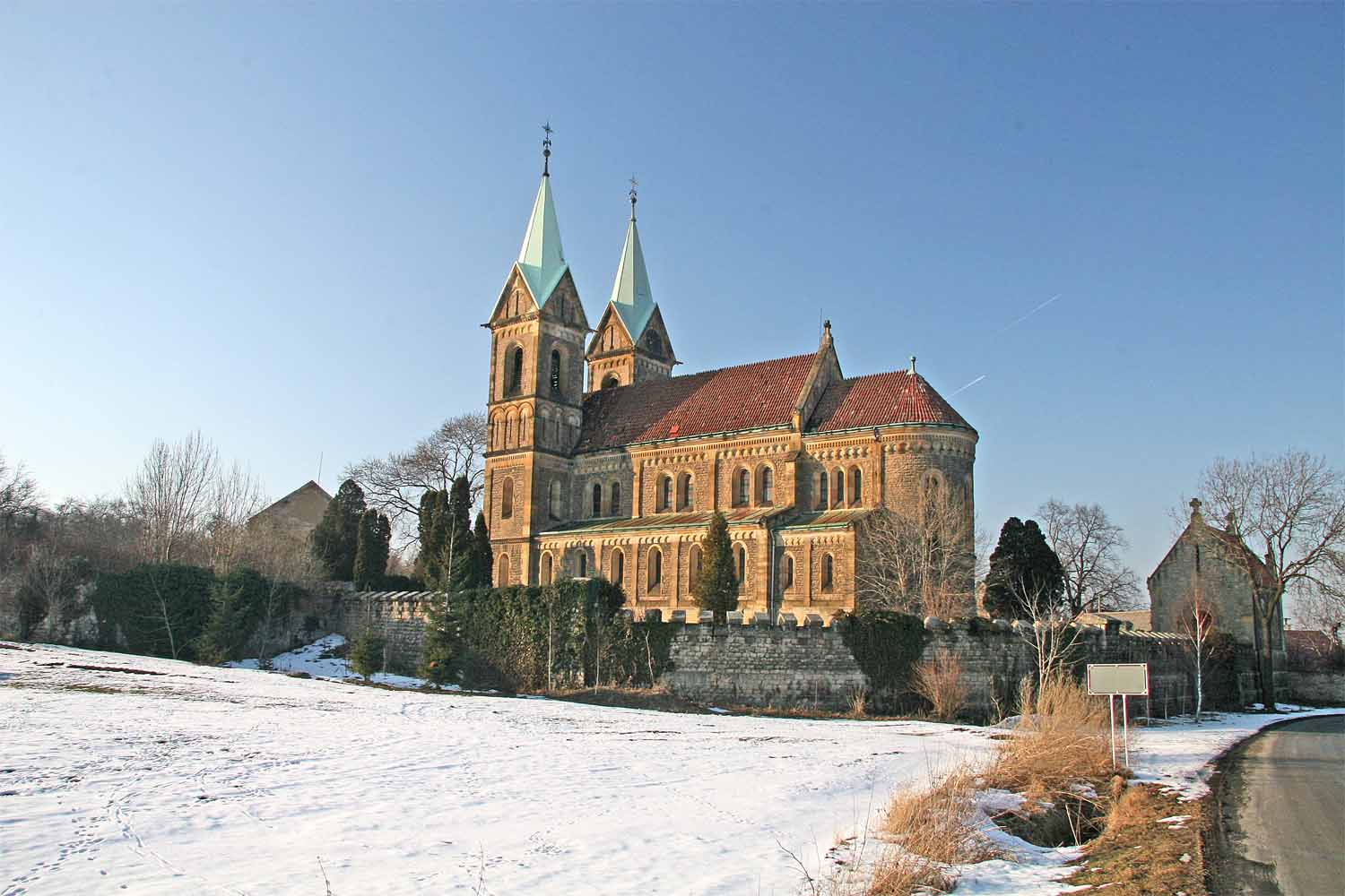 Novorománský koste Navštívení panny Marie v Gruntě